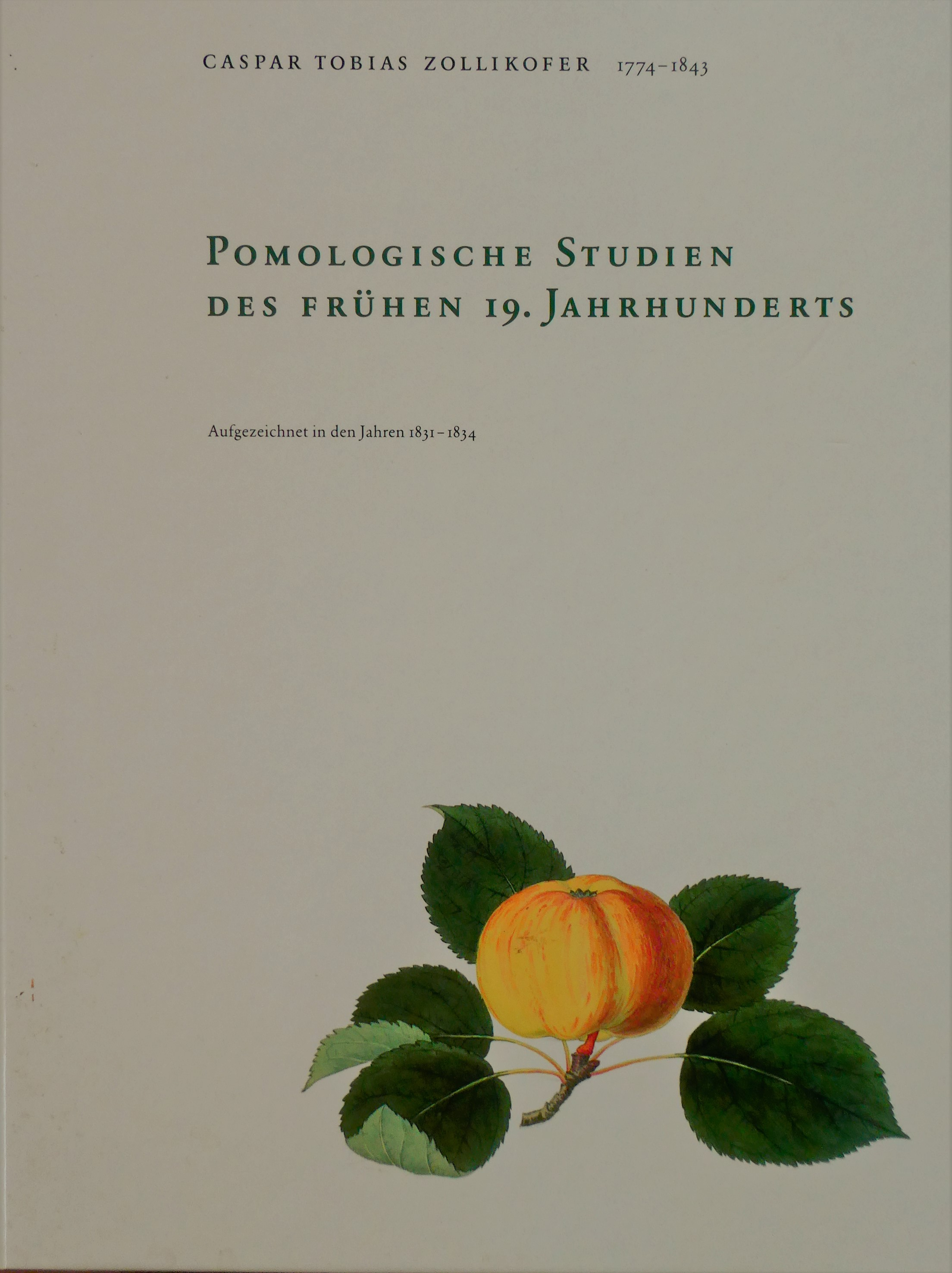 Titelblatt/Umschlag von: Caspar Tobias Zollikofer – Pomologische Studien des frühen 19. Jahrhunderts. Kommentiertes Faksimile. Fructus Verlag, Wädenswil (Schweiz) 2005.